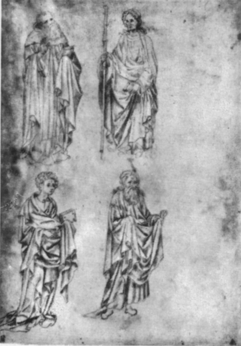 Pisanello, disegni, staedel, 5431r